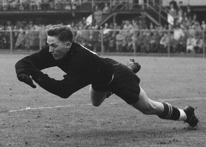 Interlandvoetbal Nederland tegen Zwitserland, Rotterdam spelmoment. [Antonio Permunian] (keeper of Switzerland)